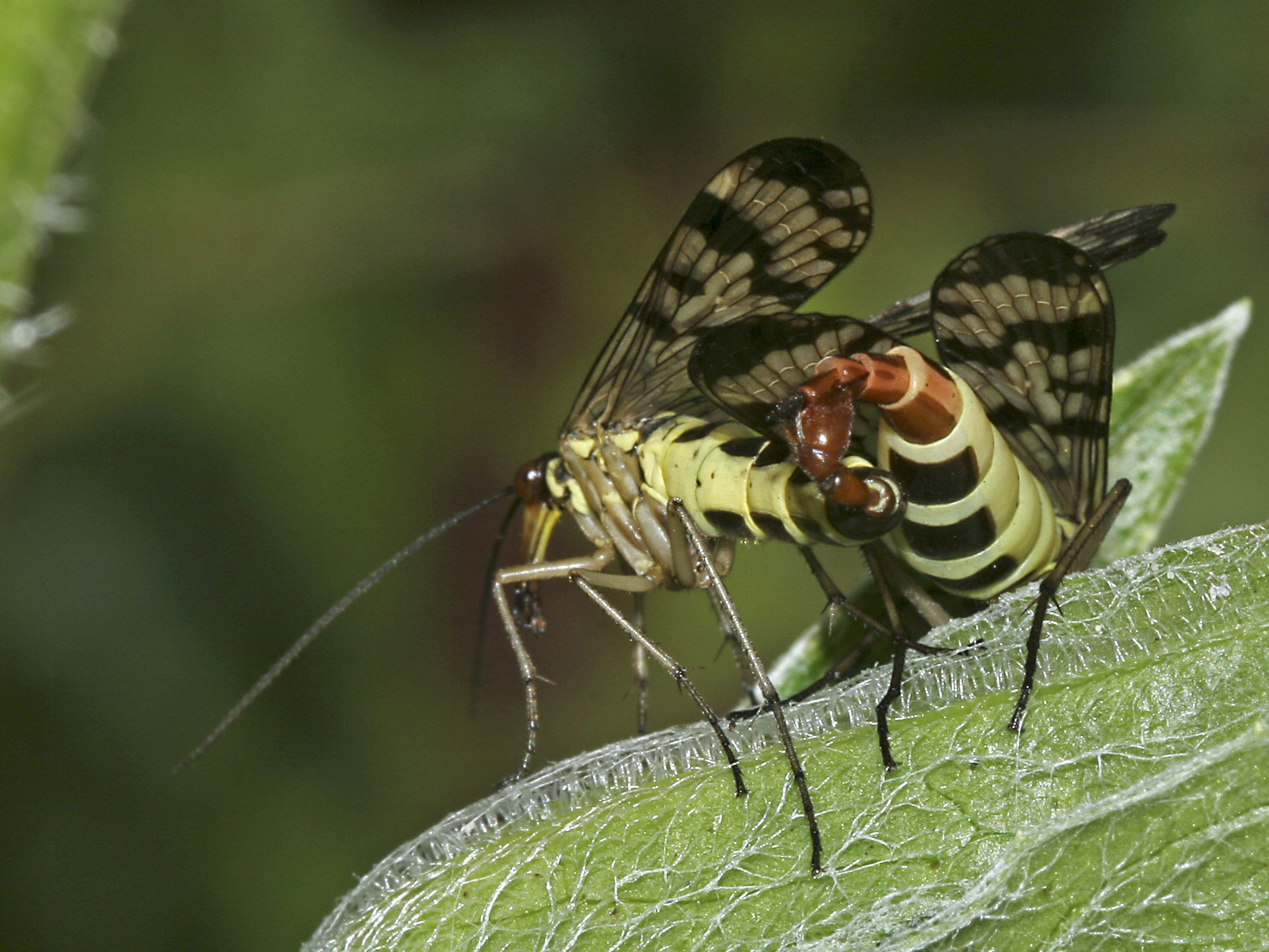 Panorpa communis copula.